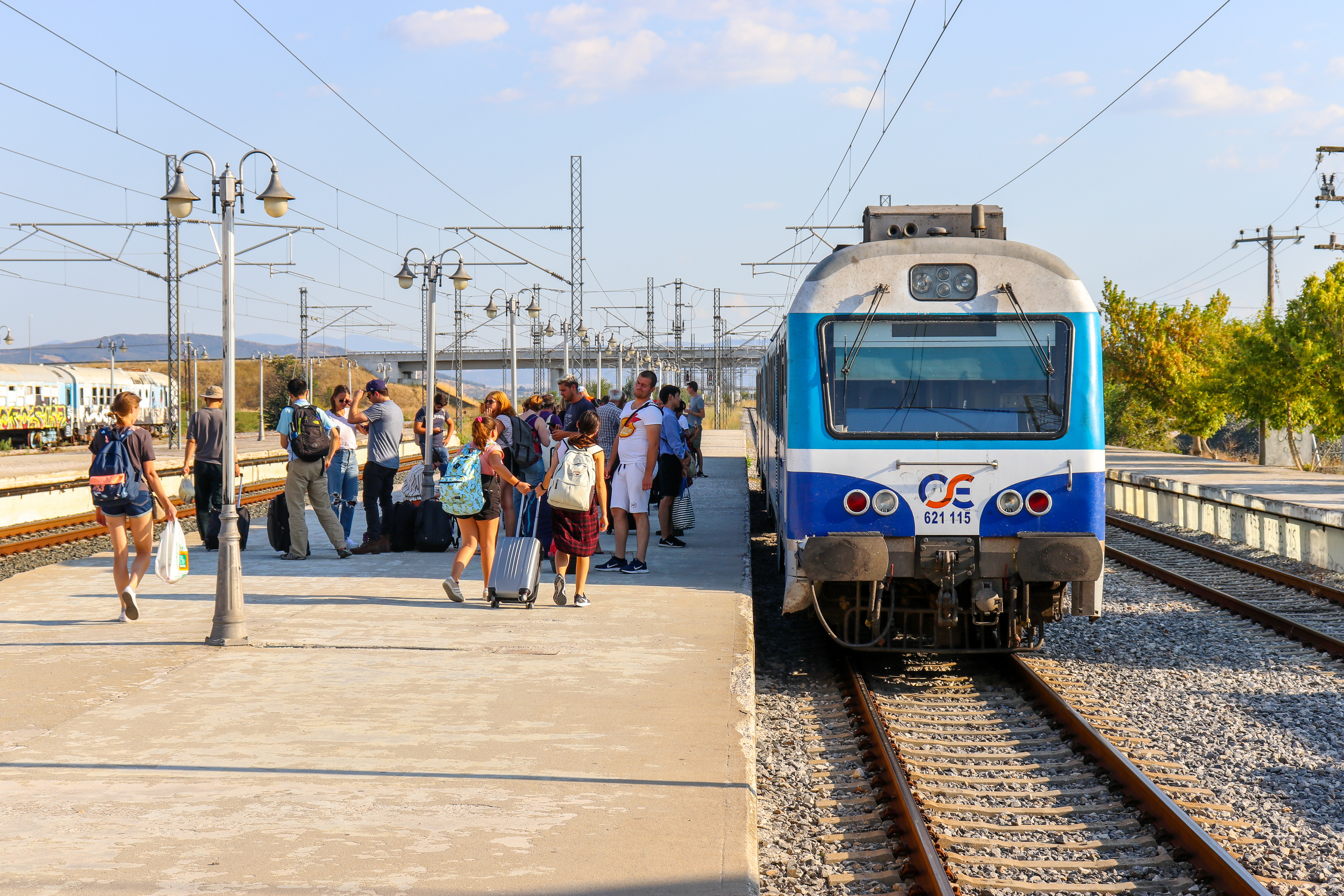 Железнодорожная станция "Палеофарсалос". Поезд OSE 621 115 Палеофарсалос-Калампака сломался, пассажиры ждут замену на платформе